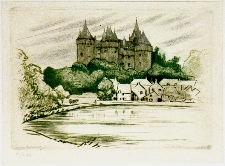 Le château de Combourg, pointe-sèche en couleur